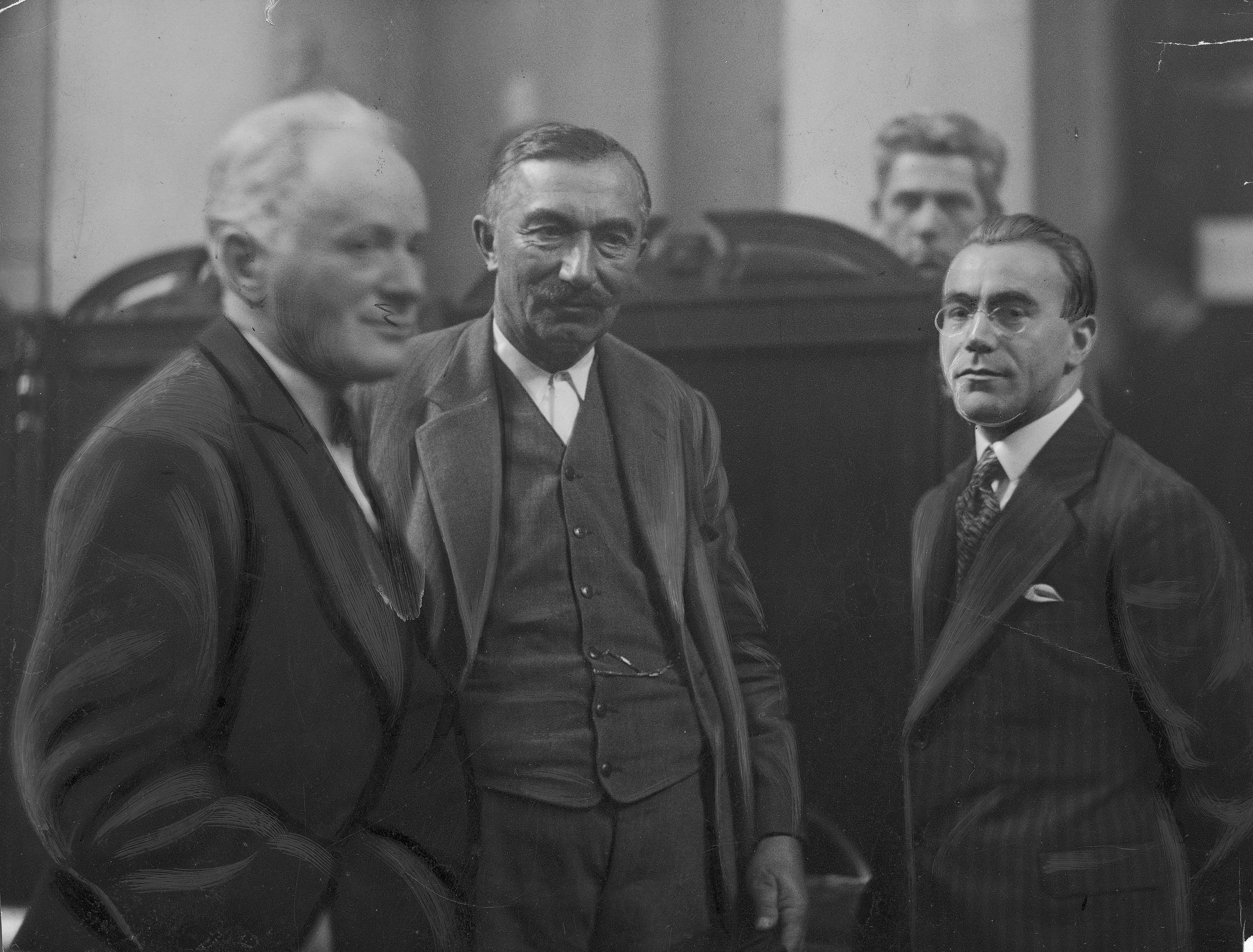 Proces brzeski w Sądzie Okręgowym mieszczącym się w pałacu Paca przy ulicy Miodowej 15 w Warszawie. Oskarżeni Kazimierz Bagiński, Wincenty Witos i Herman Lieberman (stoją od prawej) podczas przerwy w procesie.